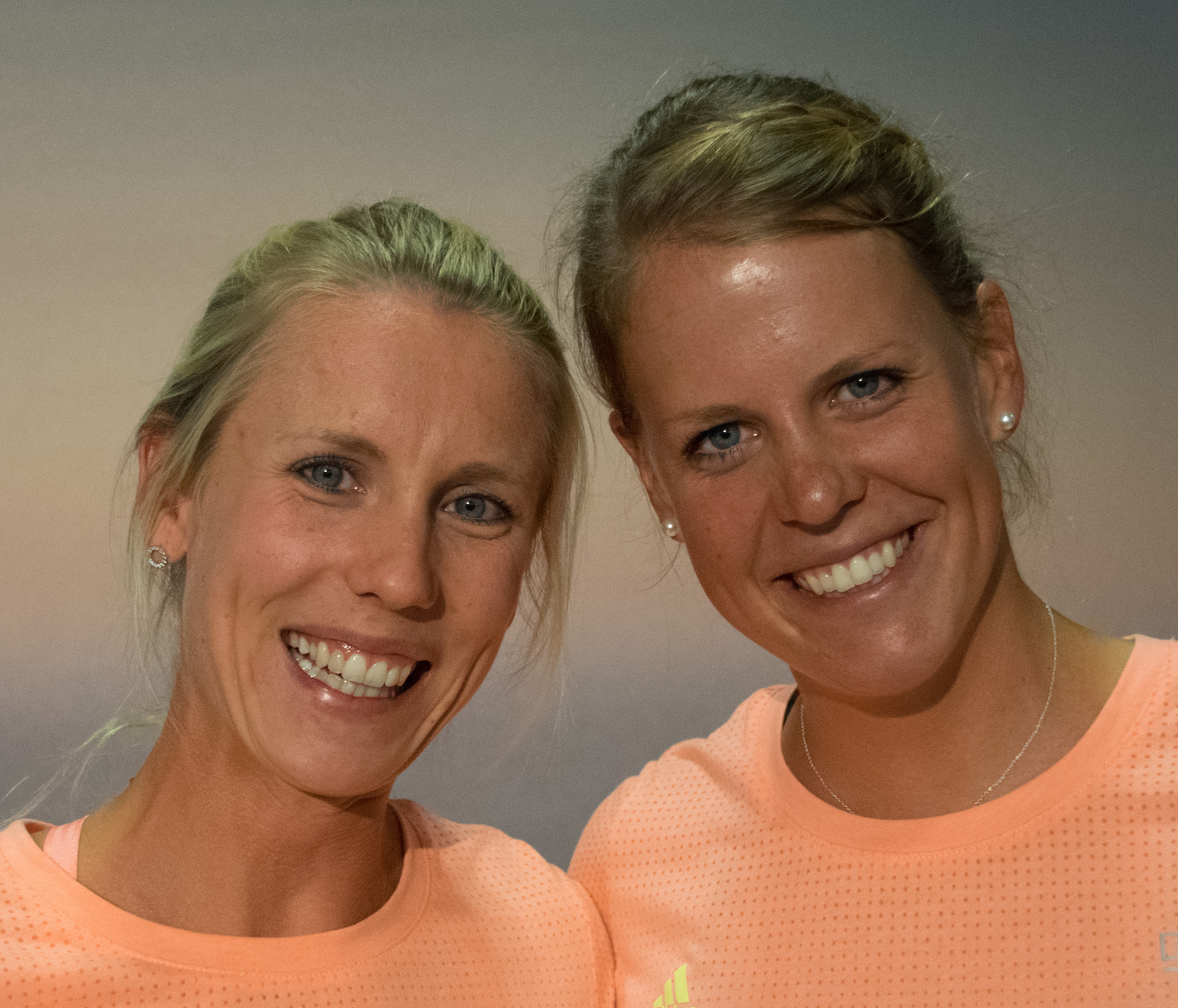 Pressetermin zum Abflug der Olympiamannschaft am 1. August 2016 am Frankfurter Flughafen